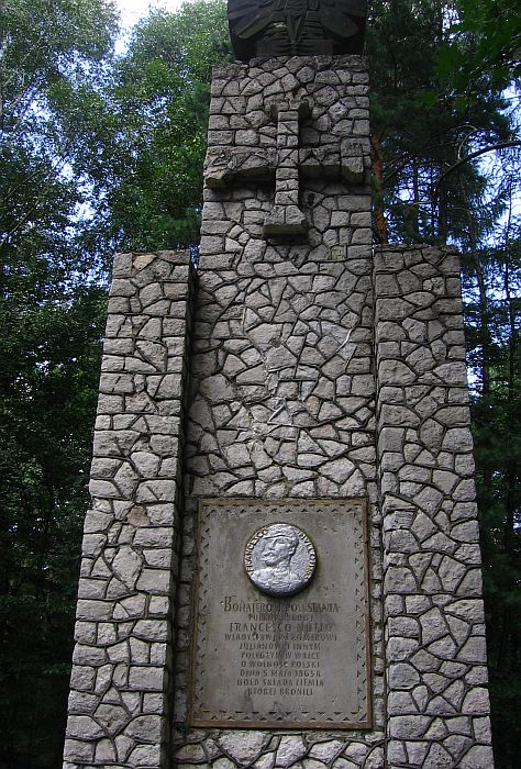 Pomnik Francesco Nullo w Krzykawce